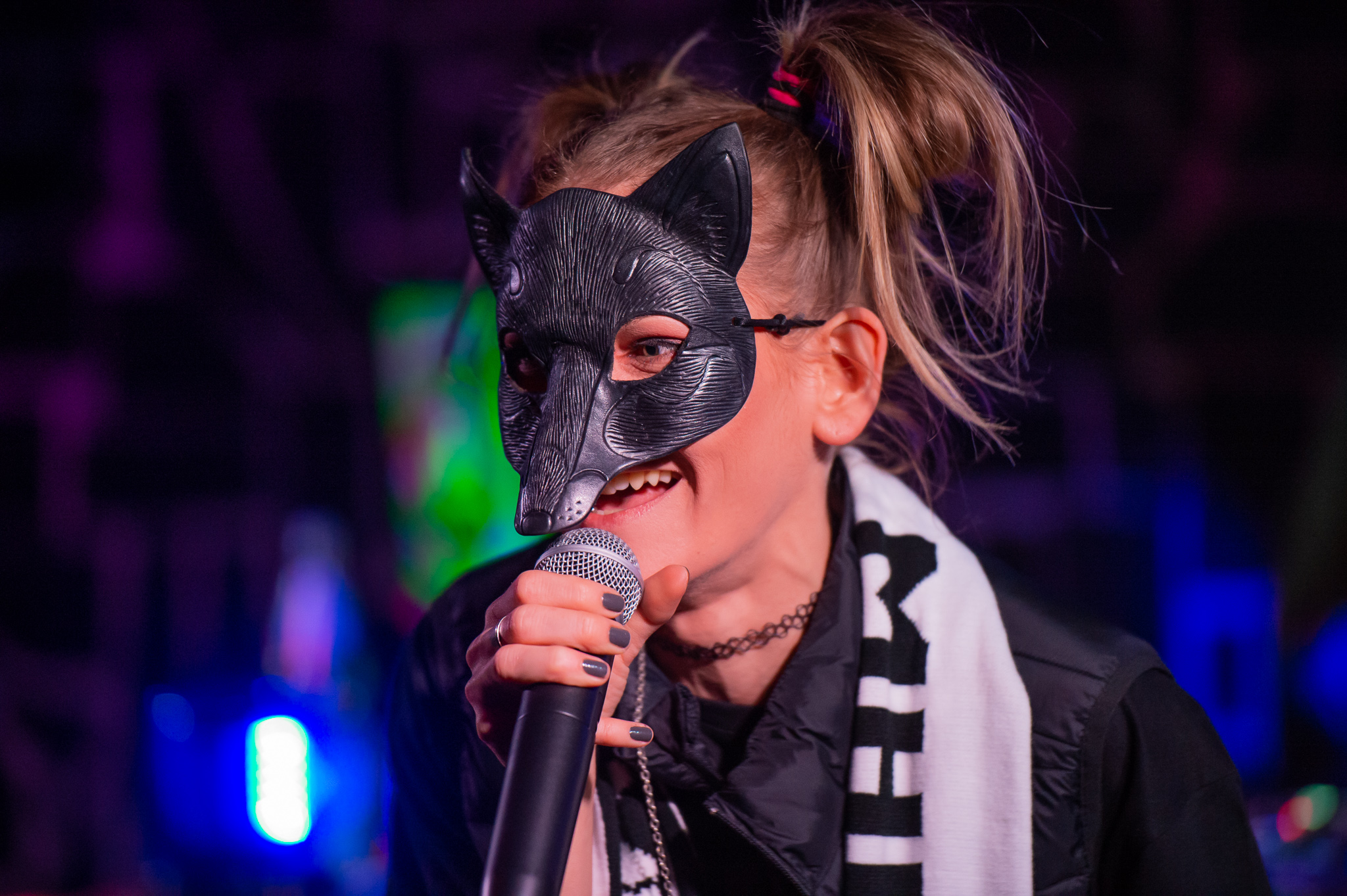 Antifuchs,Club Stereo,Concertbüro Franken,Emilia Reichert,Konzert,Livekonzert,Livemusik